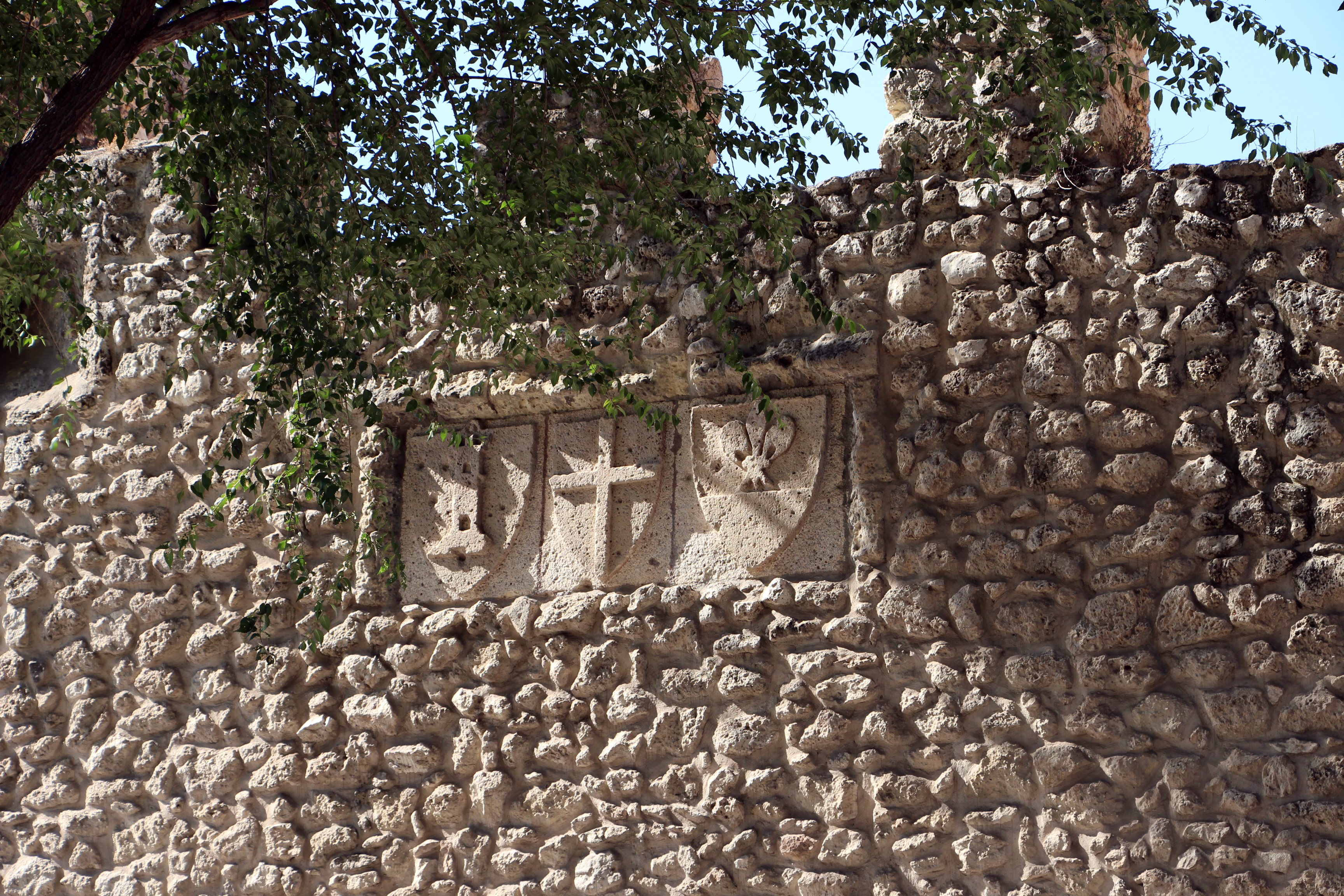 Sassari